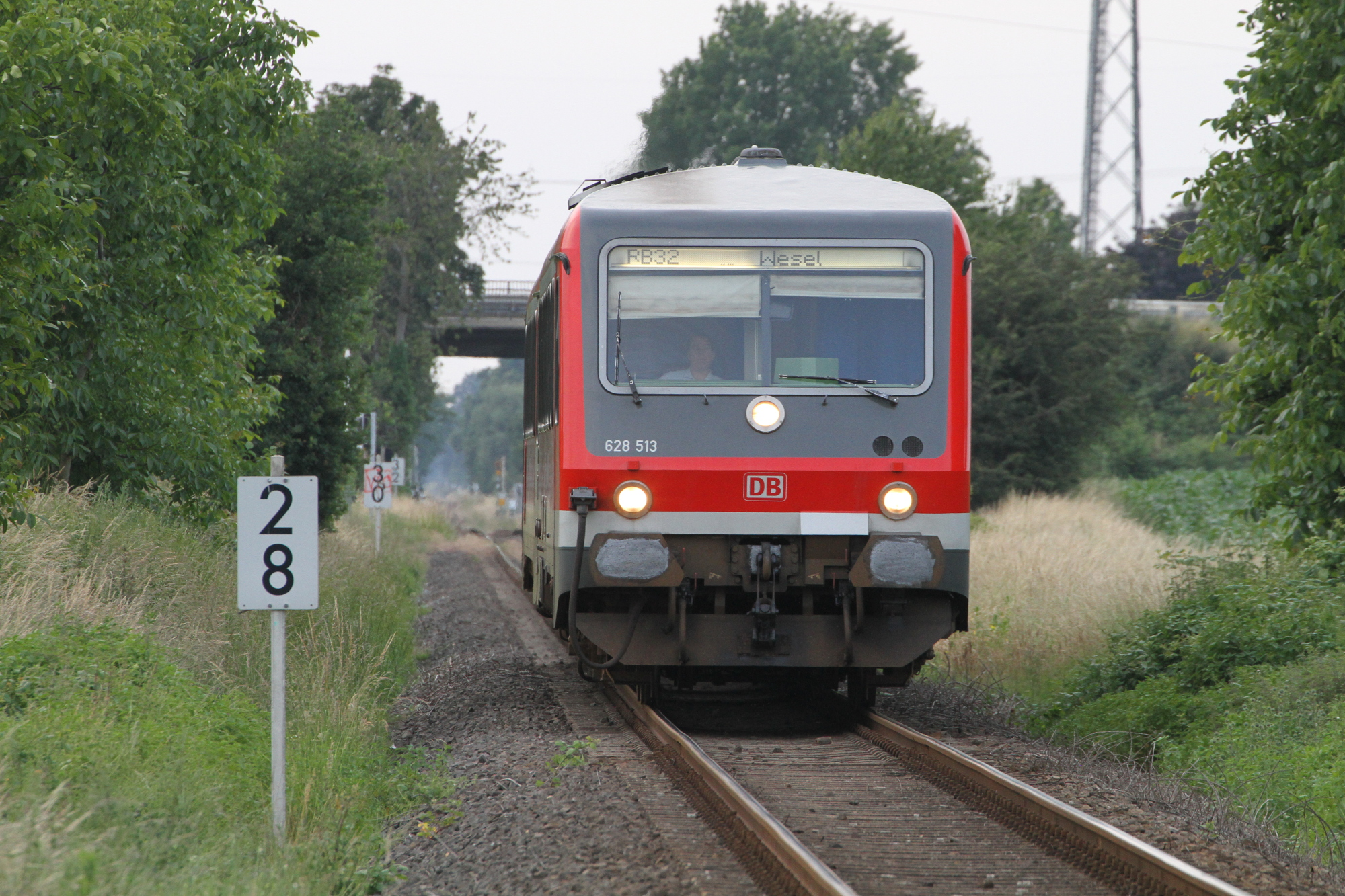 Regionalbahn 32 bei Wesel-Feldmark